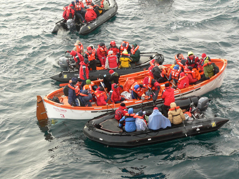 Untergang der MS Explorer und Rettungsaktion der MS Nordnorge am 23.11.2007 im Bransfield Strait